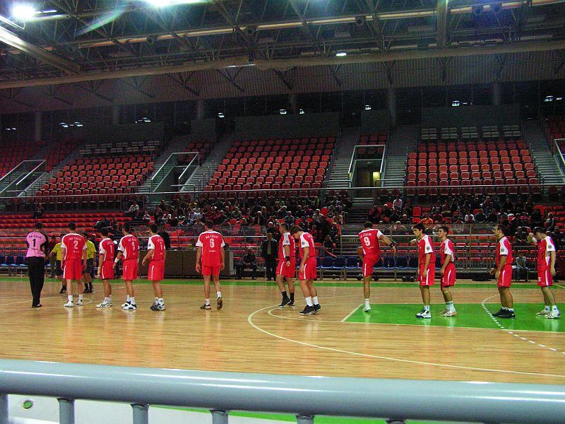 Rukometni klub "Čelik" Zenica